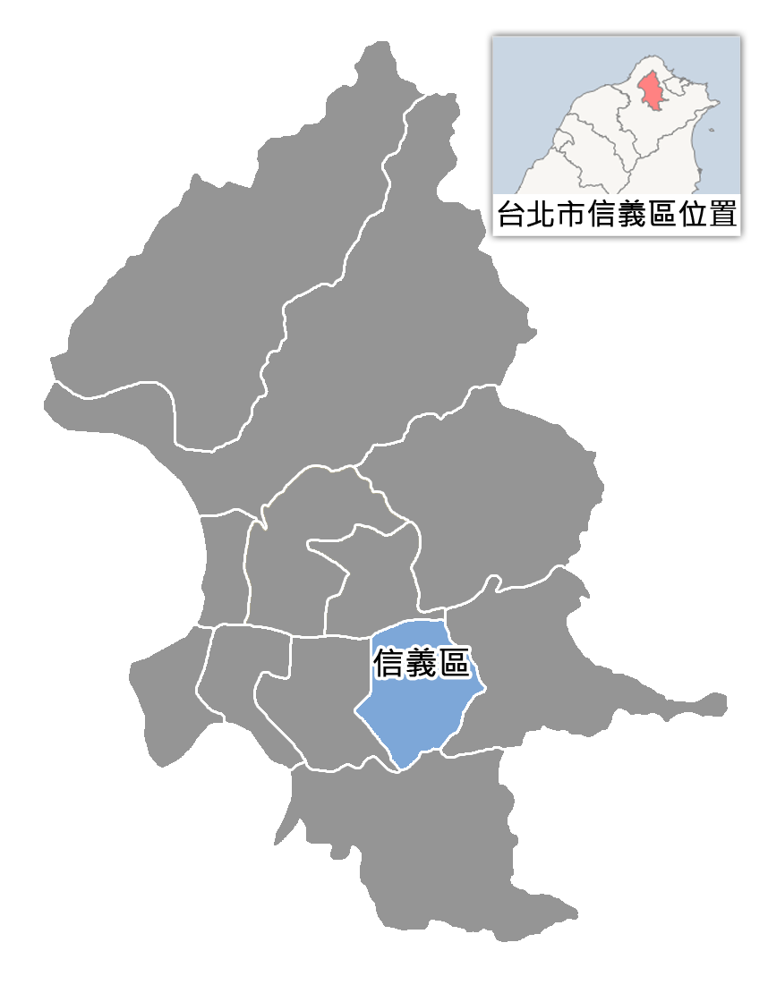 台北市信義區位置